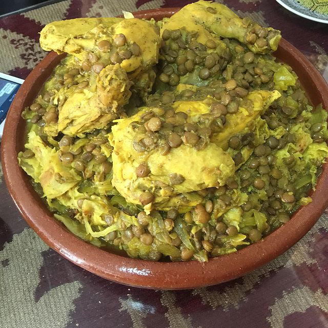 رائعة" ولذيذة "شهية